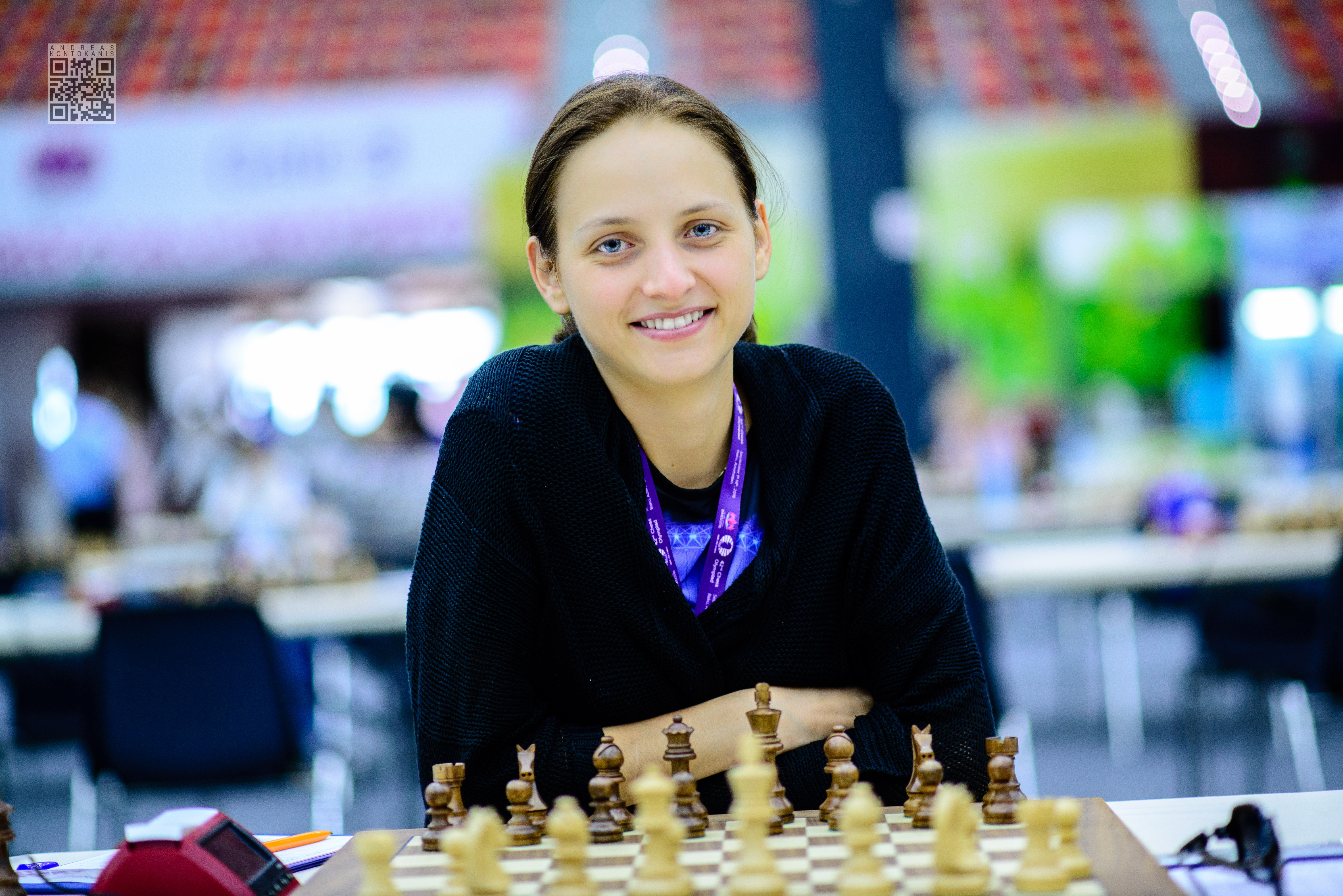 Nikolova Adriana